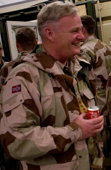 Norwegian Chief of Defense, Harald Sunde.